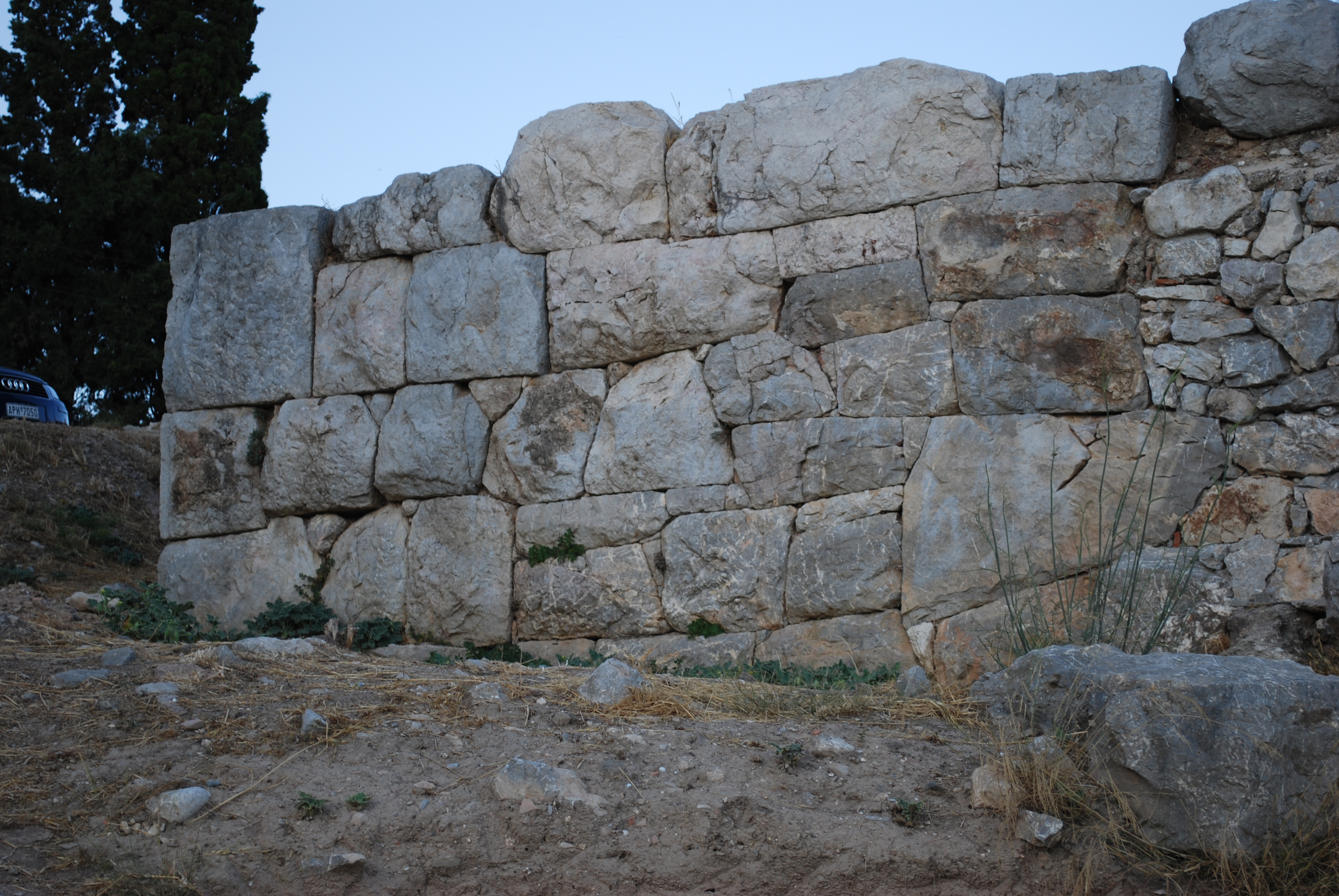 Asiné : l'enceinte mycénienne en appareil polygonal.